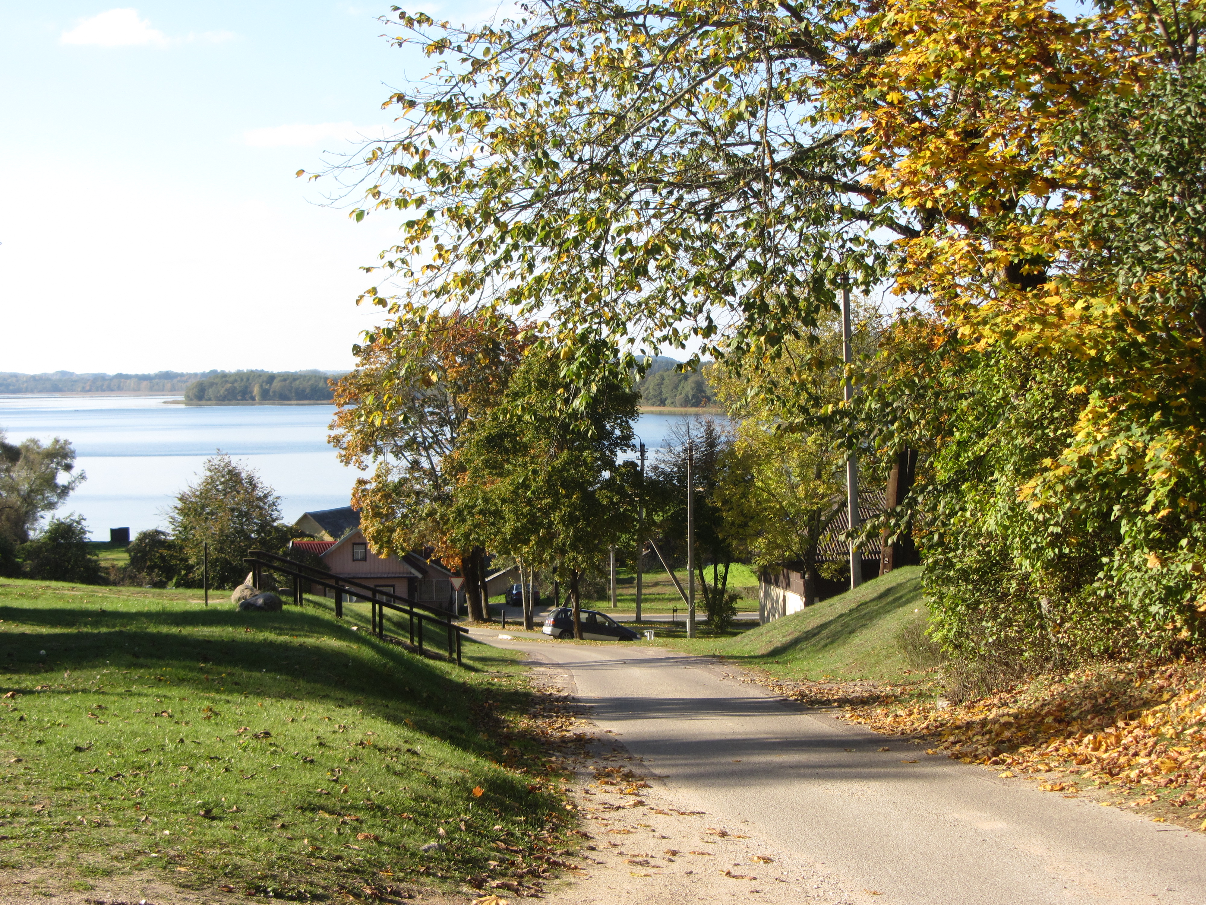 Palūšė, Lithuania